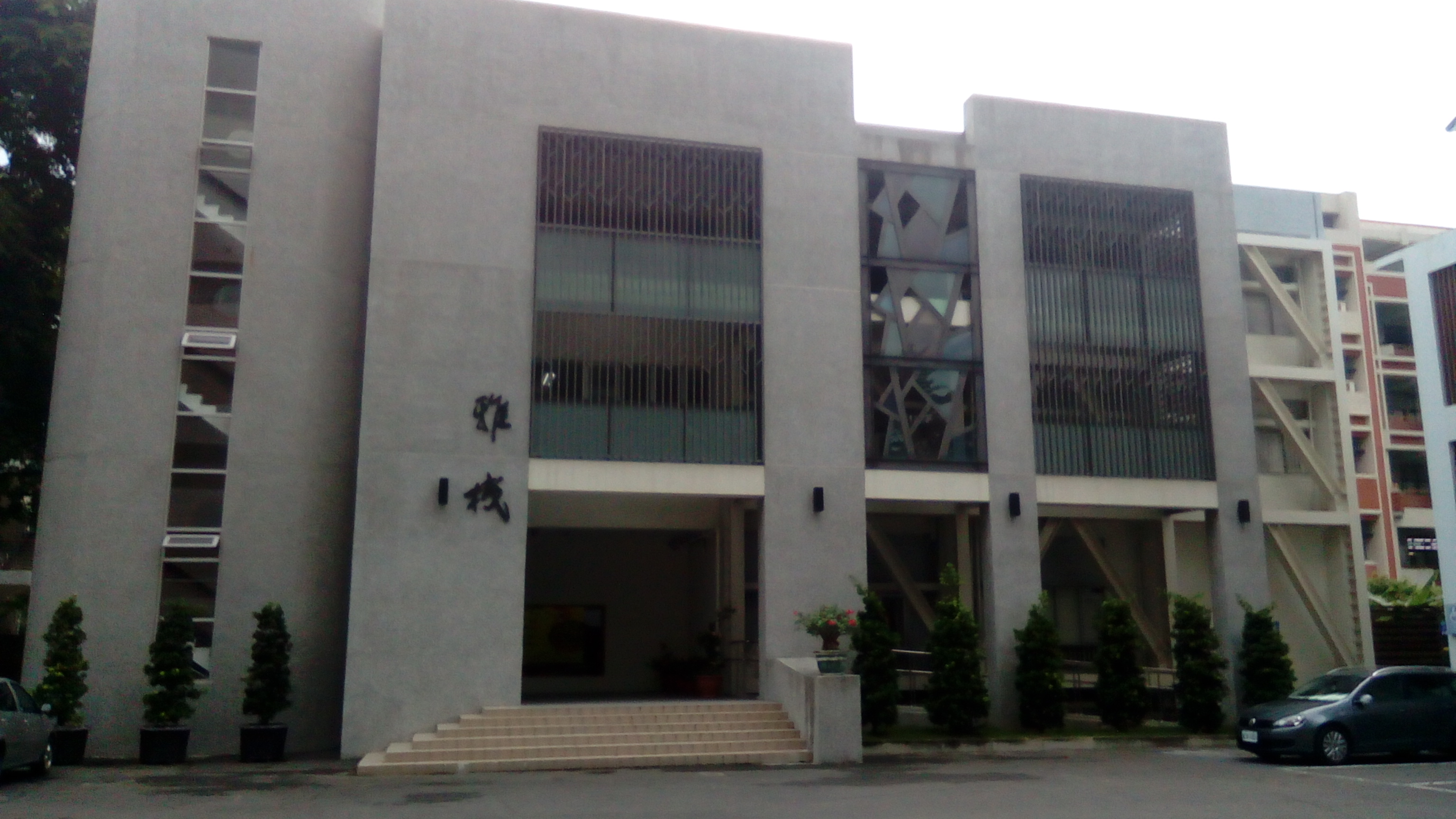 簡稱H棟 非家政系所在的生科大樓 那是LT棟